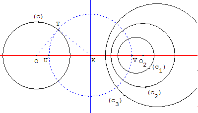 Faisceau de cercles à points de Poncelet